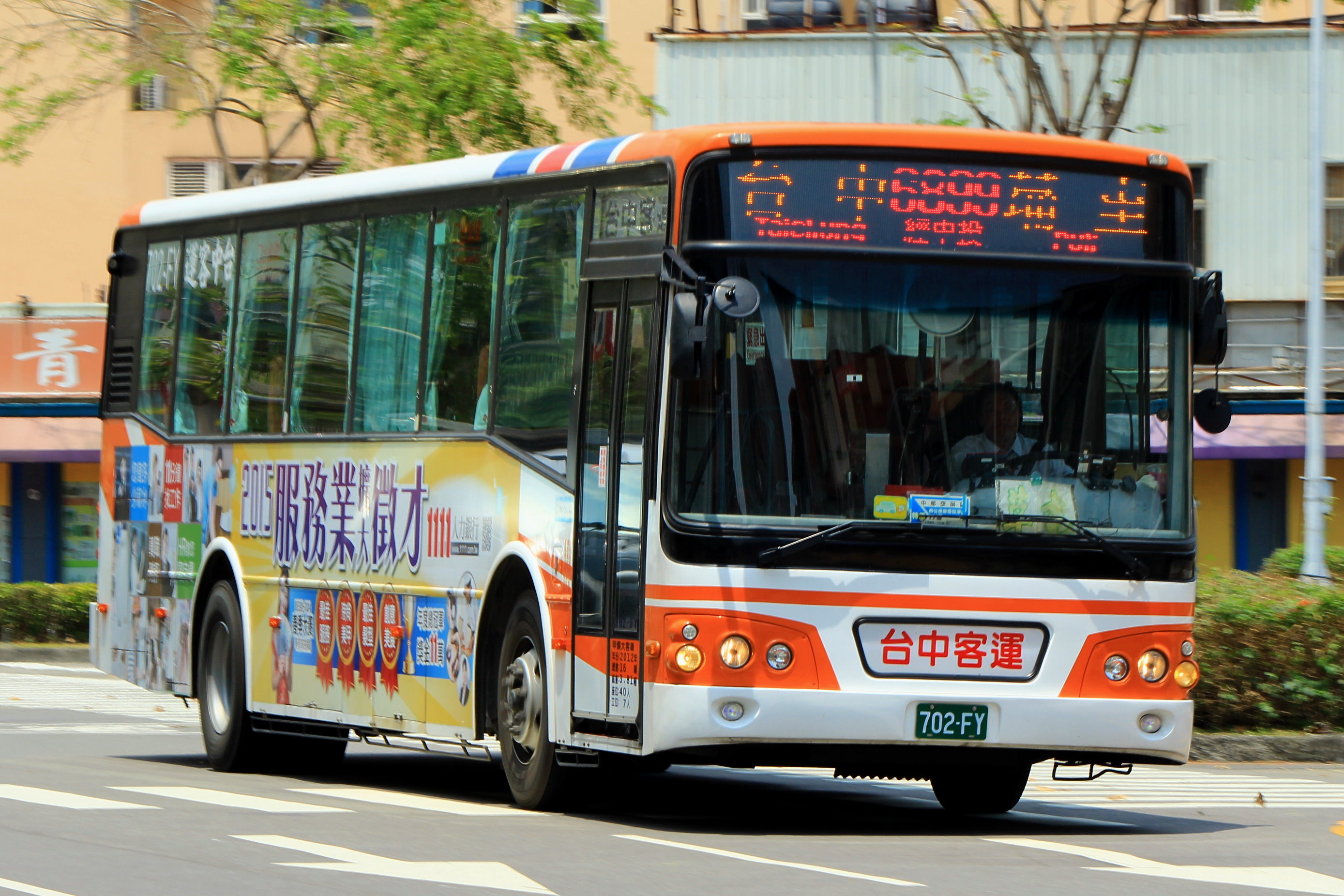 中文（台灣）: 2012〈2012〉 DAEWOO BC211MA（固亞）